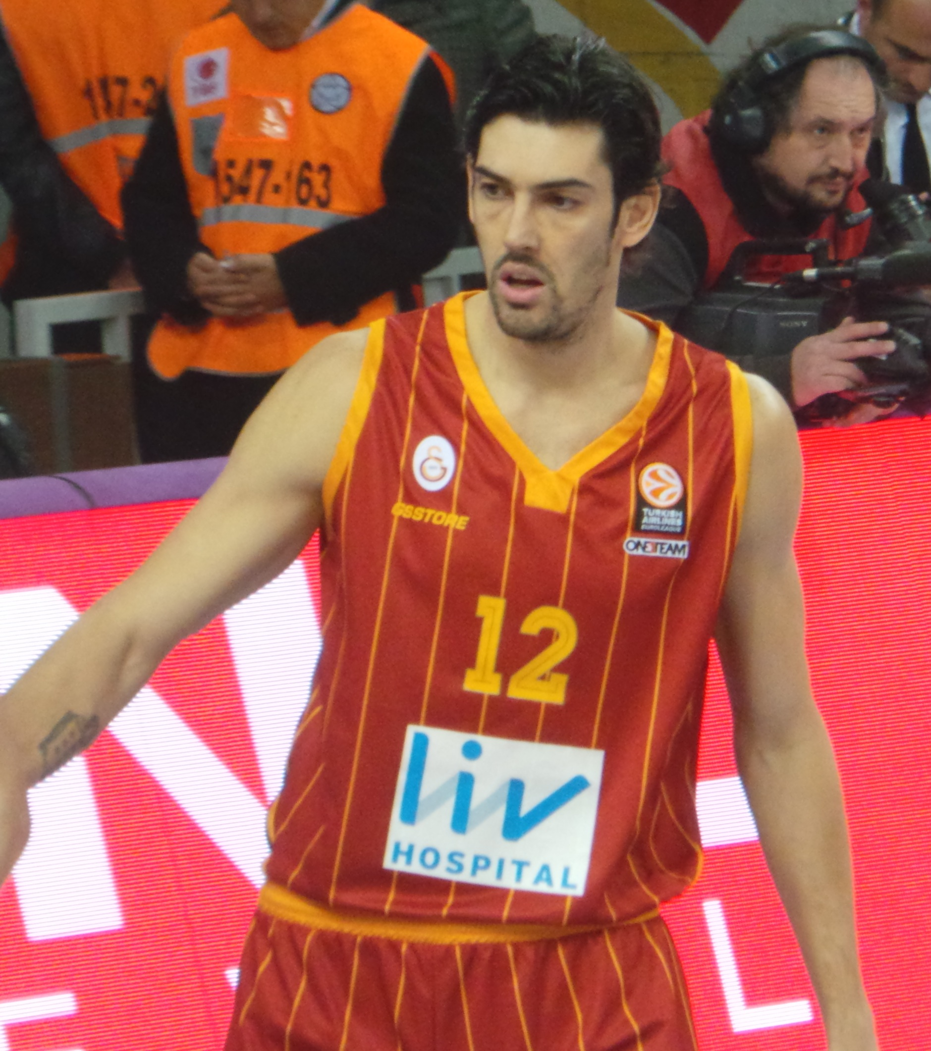 Kerem Gönlüm Galatasaray Liv Hospital - Zvezda